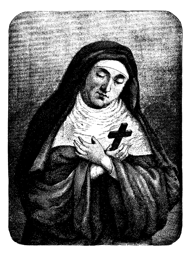 illustration du livre importé sur Wikisource - Mère Marie de l'Incarnation